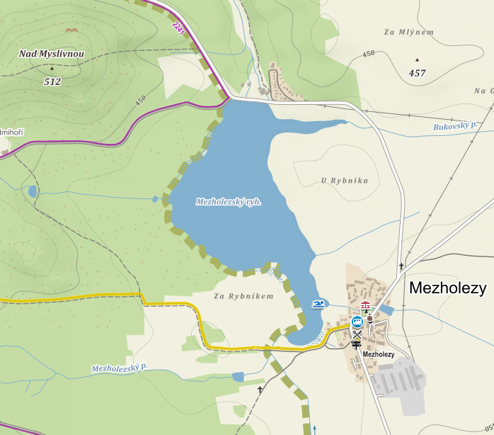 Mezholezský rybník u Mezholez na východním okraji Sedmihoří.